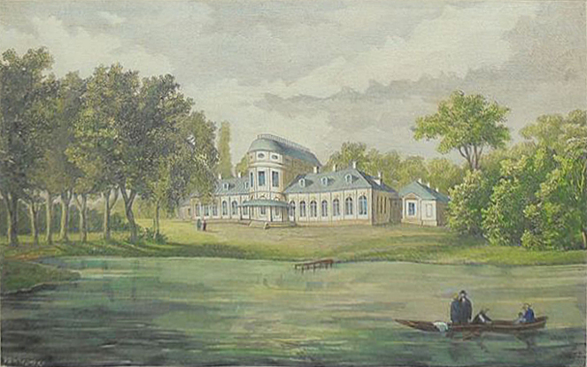 Беларуская (тарашкевіца): Шчорсы (Ščorsy), сядзіба Храптовічаў (Chraptovič)